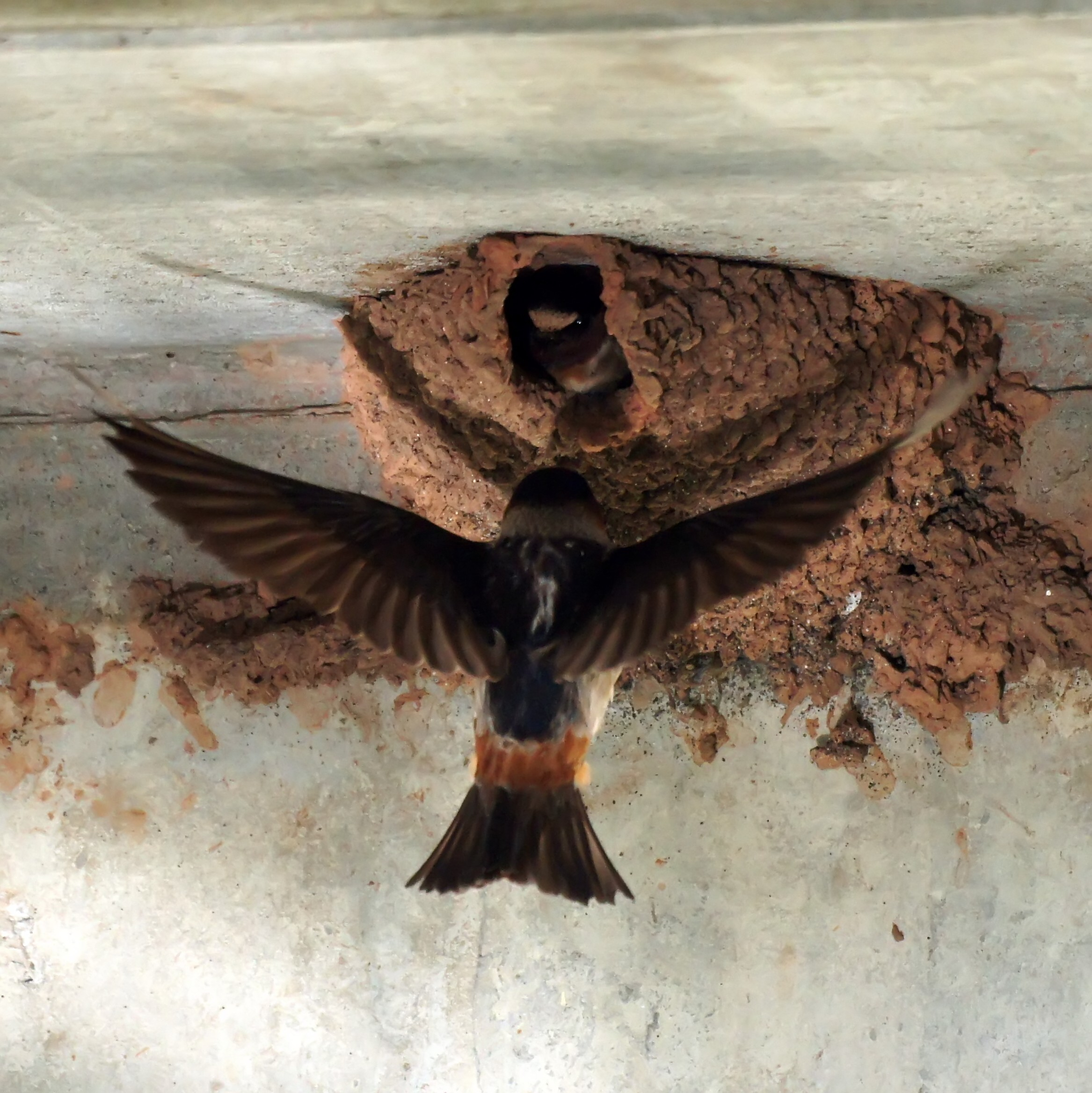 Cliff Swallow